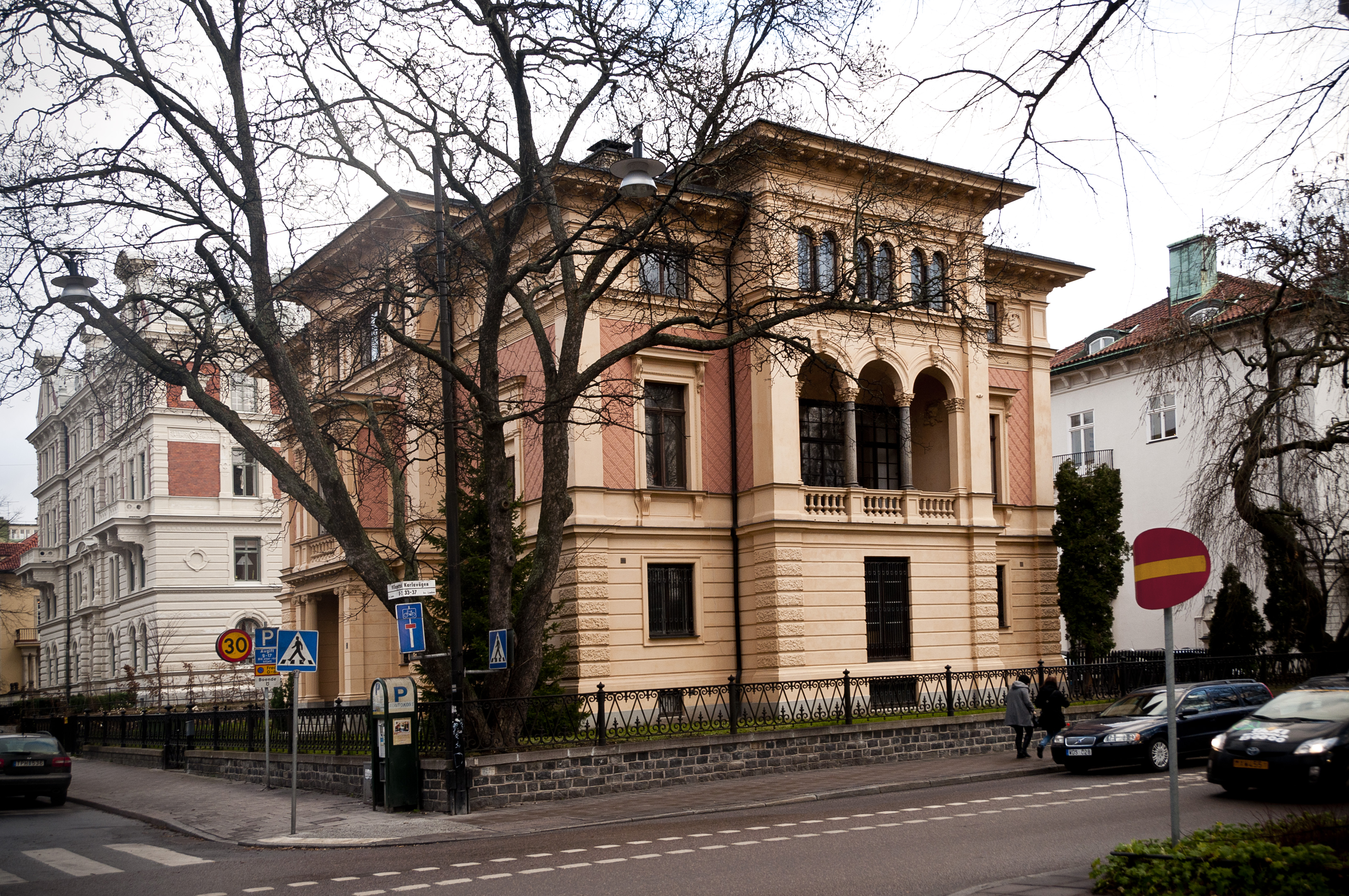 Adelsköldska villan, Karlavägen 33, Villagatan 2. Byggnadsår 1887-88, arkitekt Wilhelm Klemming efter byggherrens utkast, byggherre Claes Adelsköld, byggmästare först W Klemming därefter O Herrström